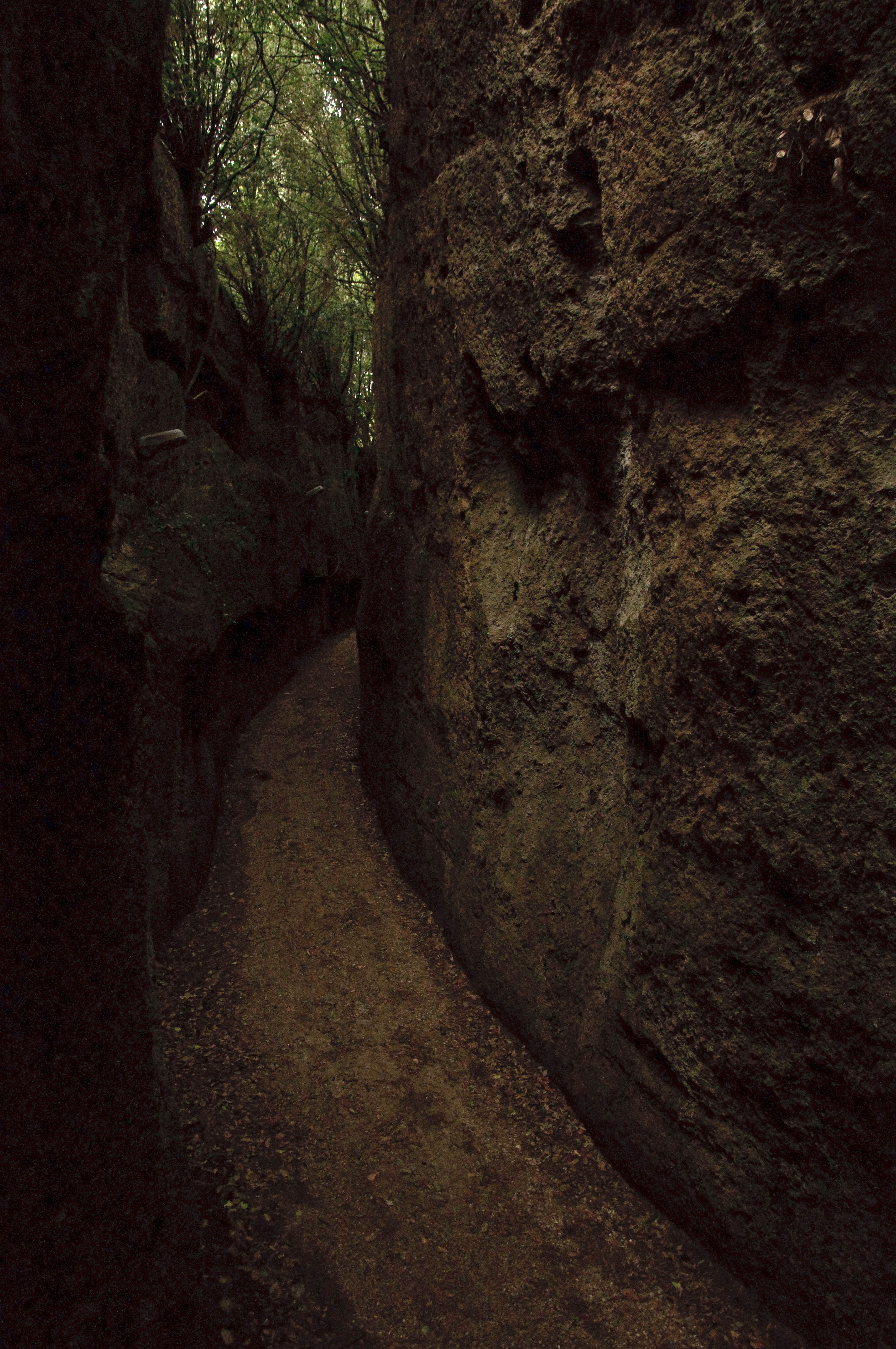 La tagliata etrusca